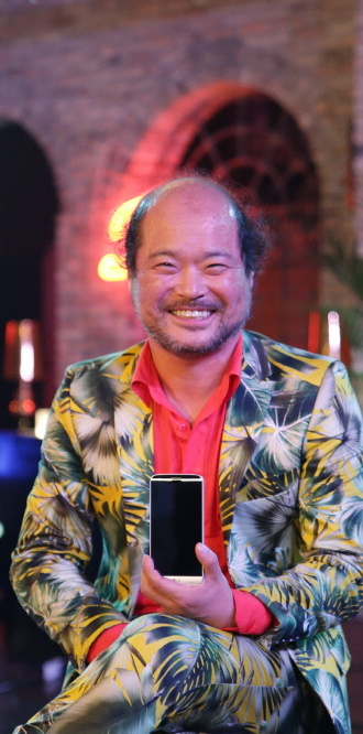 명품 ‘씬 스틸러’들이 전하는 ‘G5’의 매력 ■ 4日 ‘LG G5’ 새로운 TV 광고 On Air ■ 고창석, 예지원, 김상호, 조재윤, 문정희, 김희원 등 ‘씬 스틸러’ 배우 6명 출연 ■ G5의 매력을 배우들의 명연기와 에피소드에 담아 즐거움 선사 ※ Social LG전자 ( 에서 관련 보도자료를 확인하실 수 있습니다.